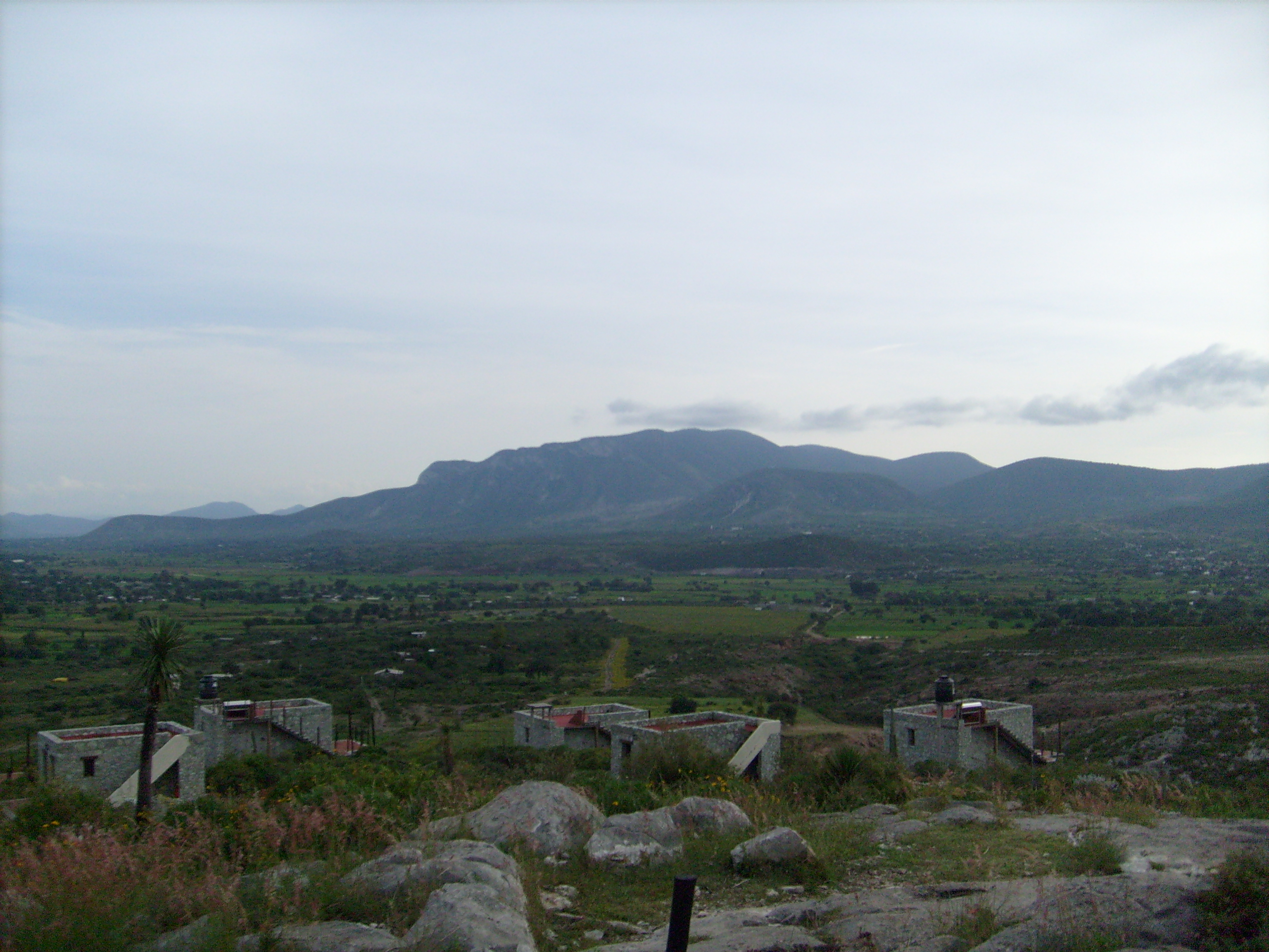 Vista del valle hacia el cerro San Miguel desde las grutas de Xoxafi